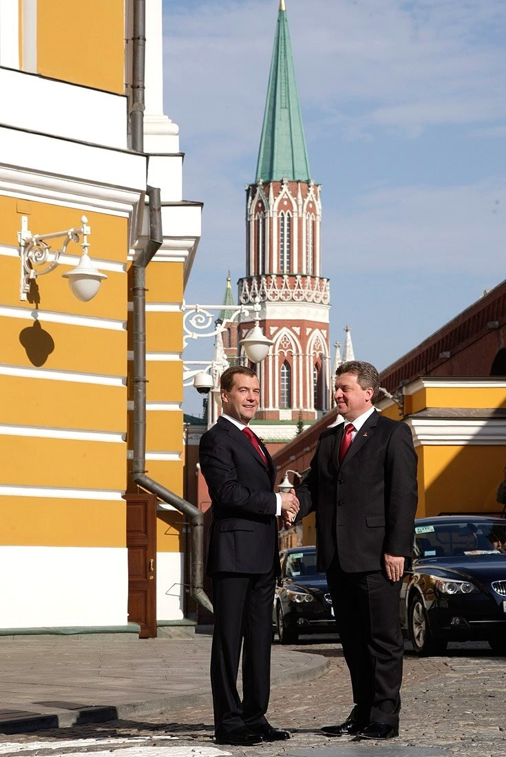 С Президентом Македонии Георге Ивановым.